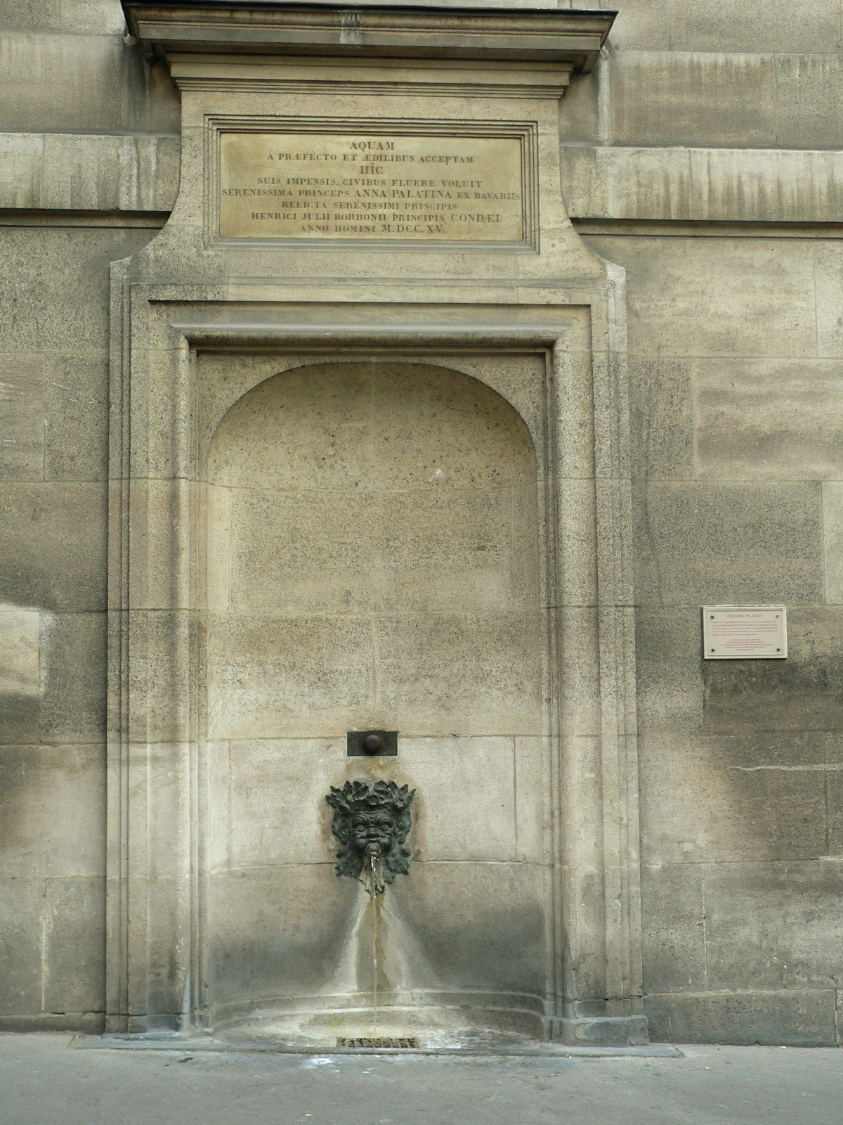 Fontaine Palatine Rue Garancière, Paris, VIe arrondissement Fontaine publique élevée par la princesse Anne de Bavière en 1715. Après la démolition des communs de son hôtel particulier auxquels elle était adossée, un nouvel immeuble fut construit en 1913. La fontaine y fut restituée à son emplacement initial. Photographe: Clio20 (2005)